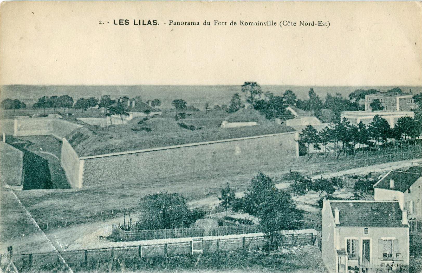 Carte postale ancienne éditée par BF à Paris, N°2Les Lilas - Panorama du Fort de Romainville (coté Nord-Est)